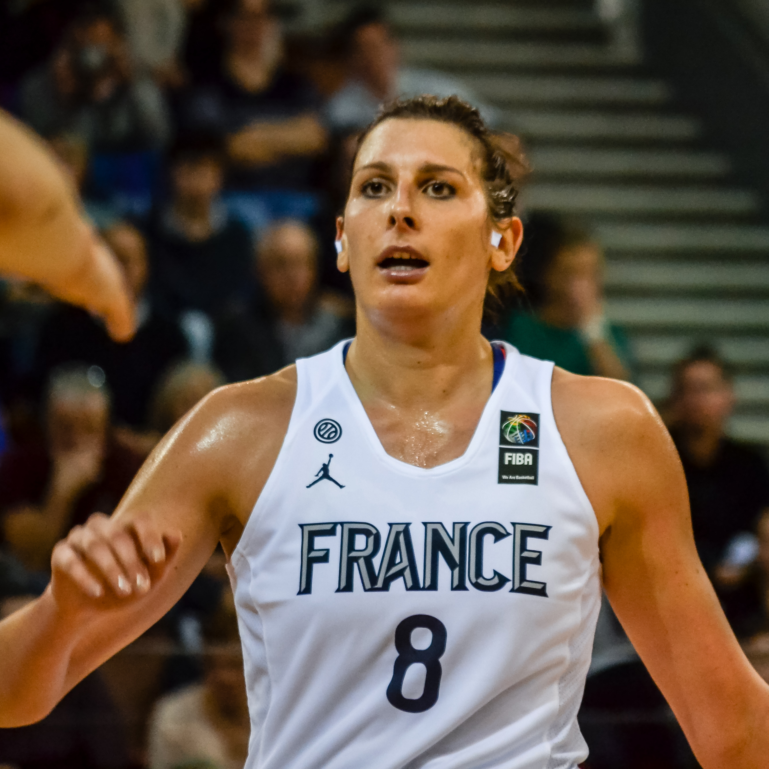 Rencontre de l'Equipe de France féminine de basket-ball contre la Finlande (90-40), comptant pour les qualifications à l'Euro 2019, le 14 février 2018 à Brest. C'était la première fois que la Brest Arena, d'une capacité de 5 000 spectateurs, accueillait un match international de basket.